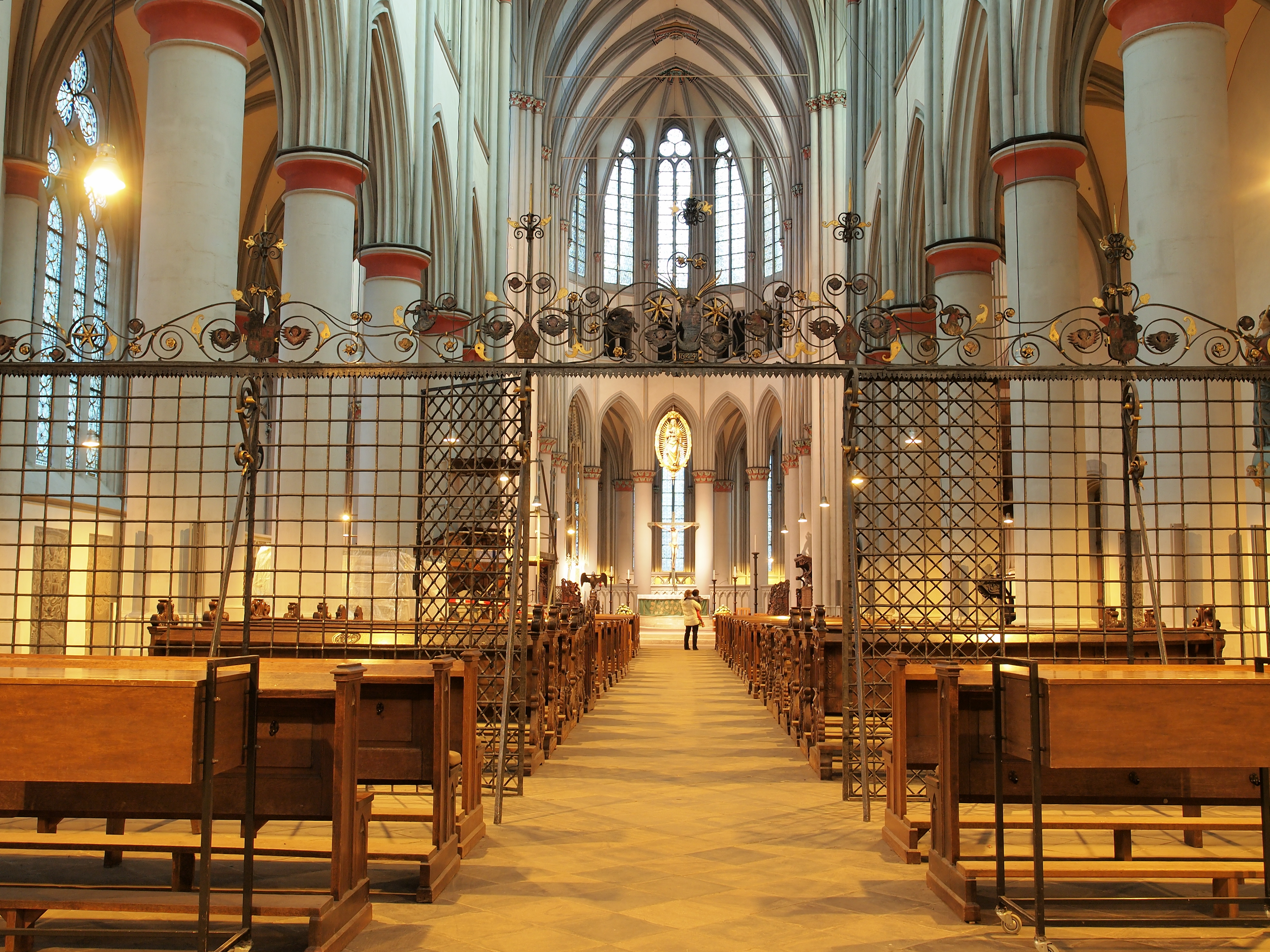 Altenberger Dom, Blick zum Chor, mit dem Wikipediastammtisch Wuppertal im Altenberger Dom